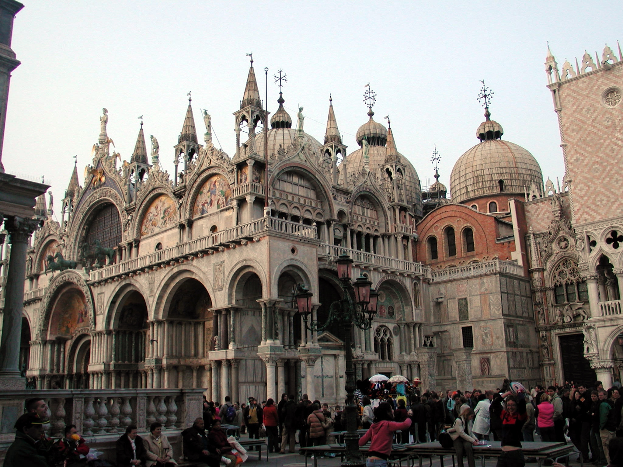 Venezia, basilica di san Marco